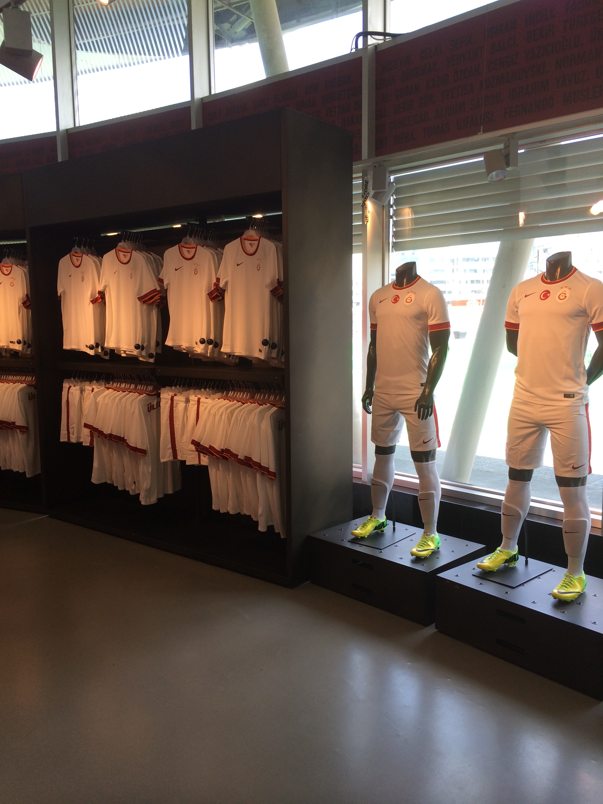 Galatasaray 2014-15 (a) kits